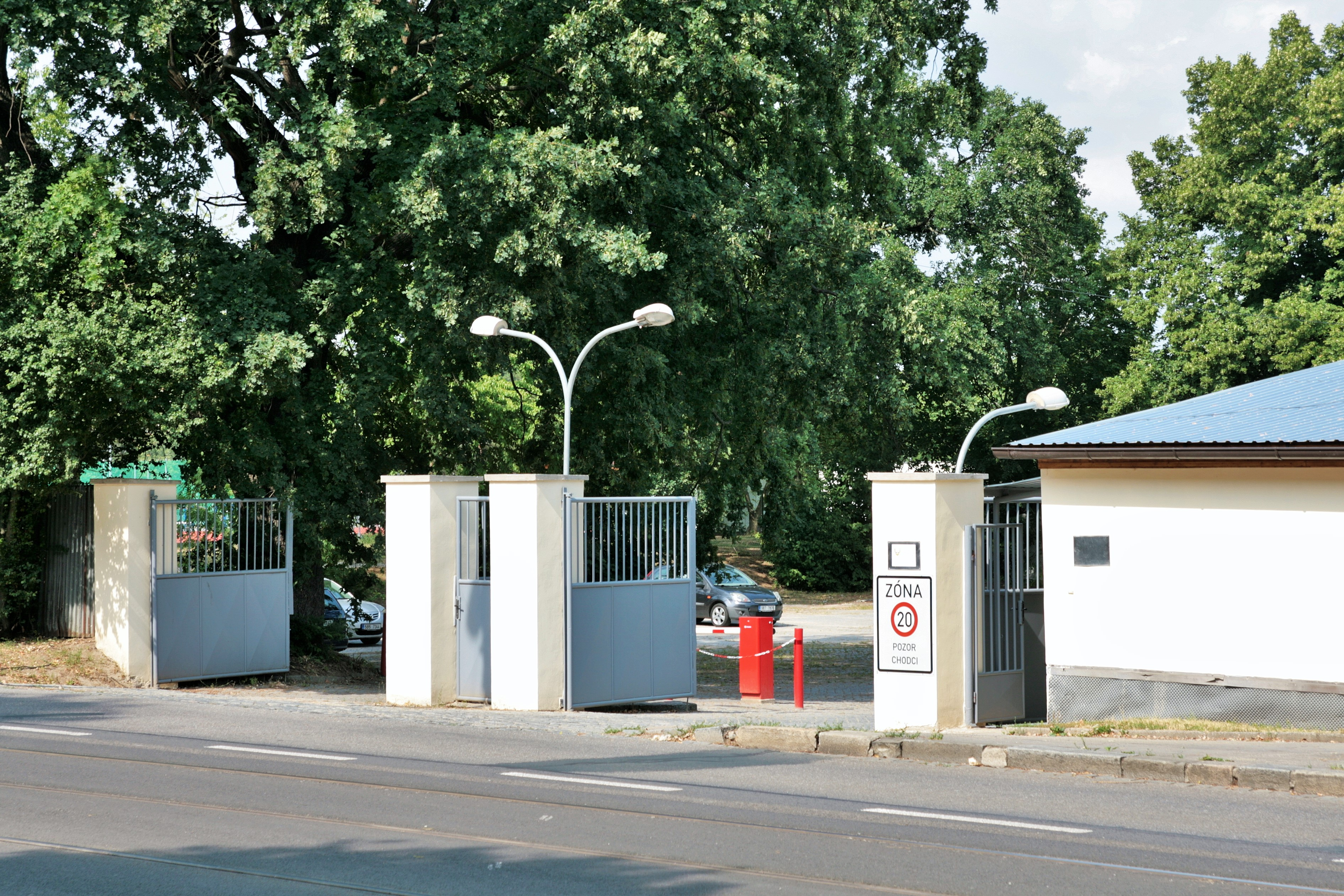 Kasárna Univerzity obrany Jana Babáka 2 v Brně, kde sídlí Centrum tělesné výchovy a sportu. Pohled na západní bránu.